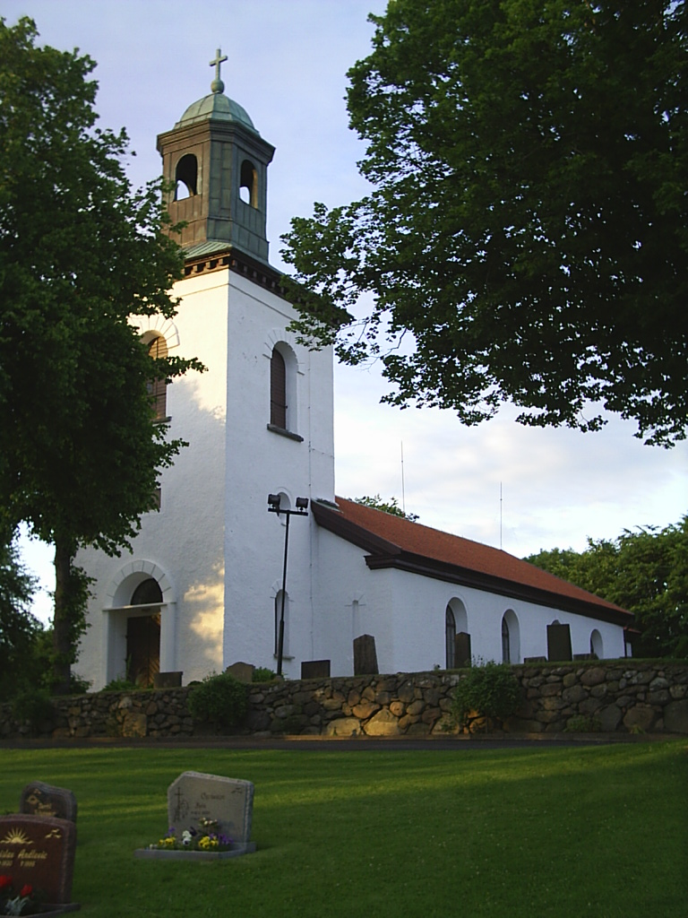 Kyrkan i Fuxerna församling, Lilla Edet. Fotograf:Tubaist